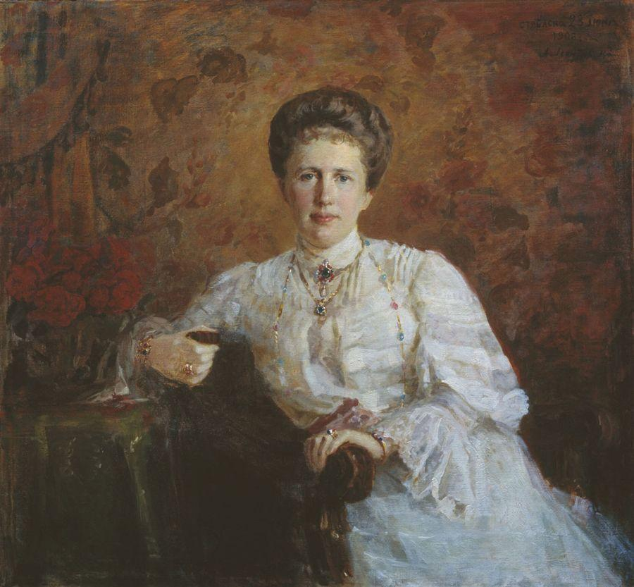 Elizaveta Mavrikievna